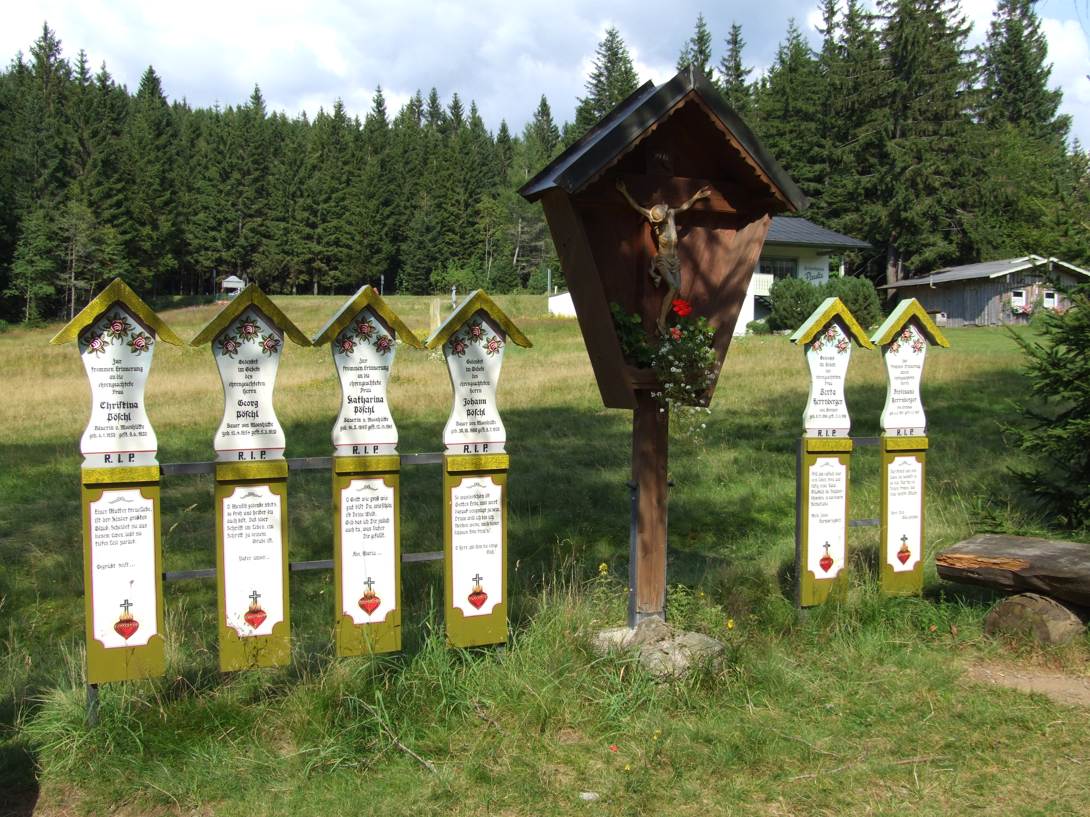 Totenbretter am Weg zwischen Brennes und Mooshütte, Gebiet Großer Arber, Bayrischer Wald